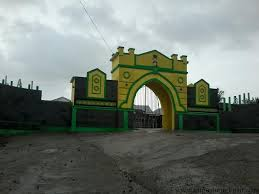 sebuah monumen